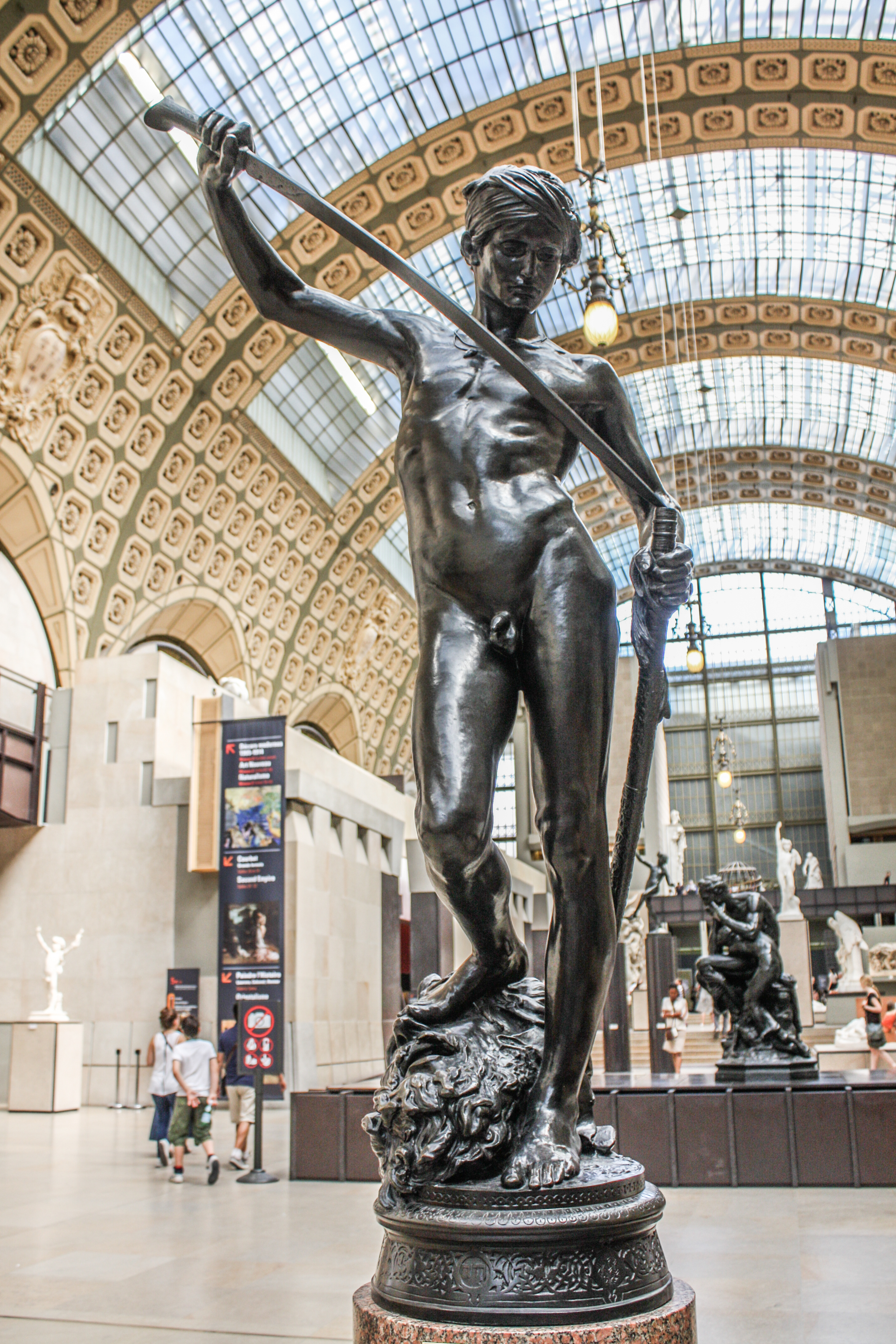 Musee D'Orsay